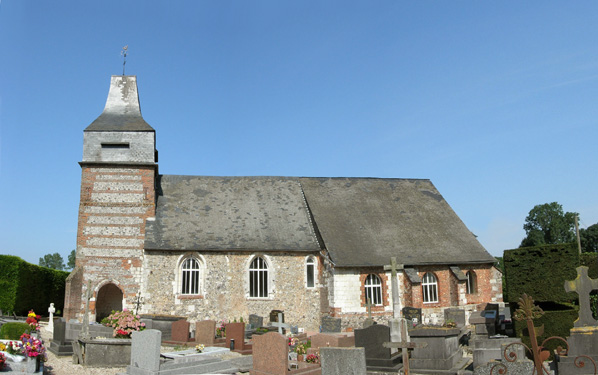 Eglise de Greny